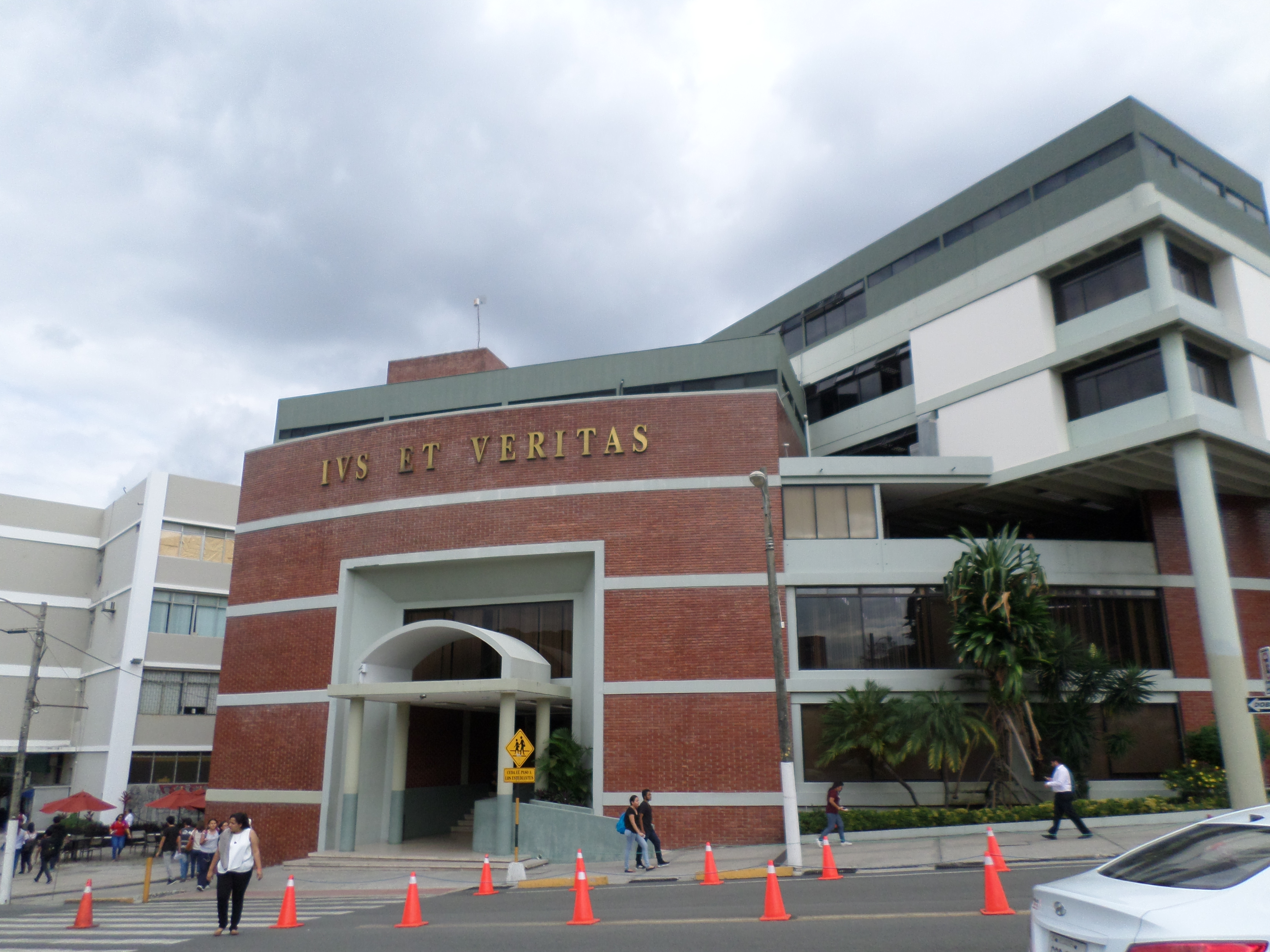 Leyes